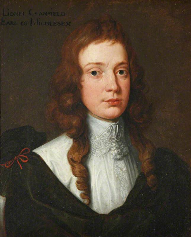 Lionel Cranfield